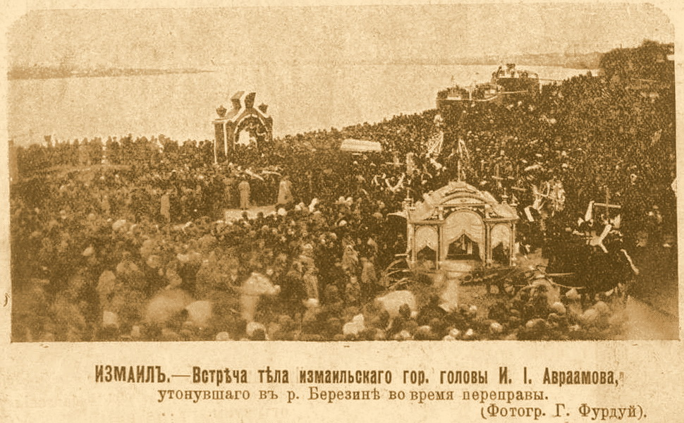 Встреча тела Измаильского городского головы И.И.Авраамова . Фото Г. Фурдуй. Измаил. 1911 г. Фотокопия